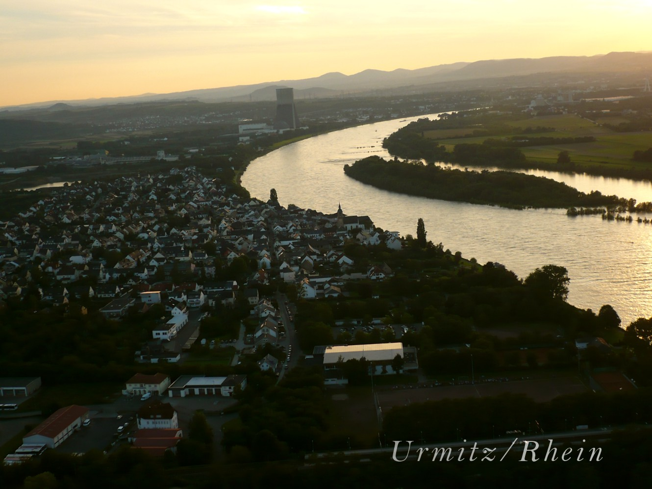 Luftaufnahme von Urmitz (links) am Rhein, Blick flussabwärts, rechts die Flussinsel Urmitzer Werth (NSG)